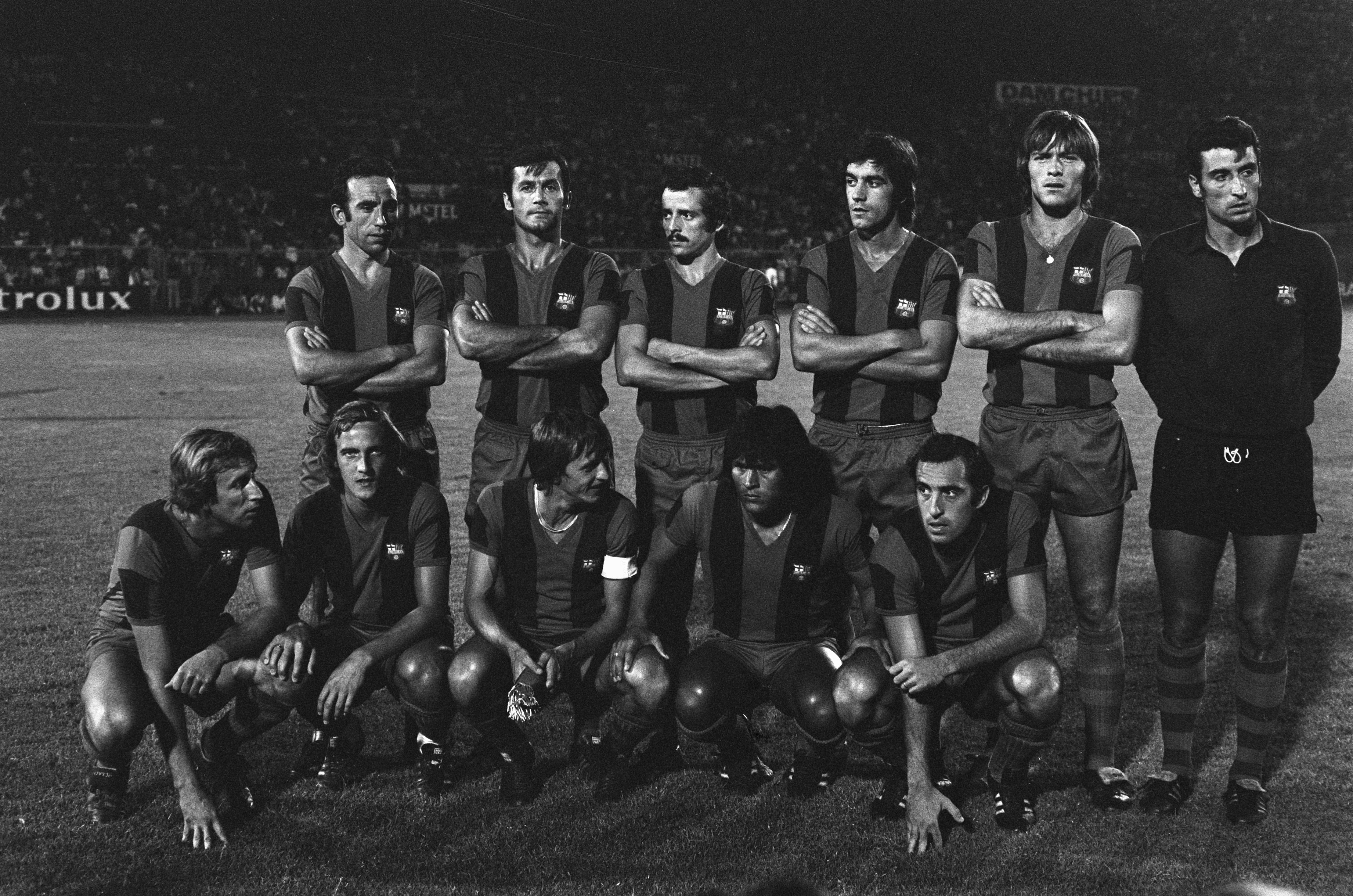 Collectie / Archief : Fotocollectie Anefo Reportage / Serie : Voetbaltoernooi Amsterdam-700 Beschrijving : Het elftal van Barcelona Datum : 10 augustus 1975 Locatie : Amsterdam, Noord-Holland Trefwoorden : portretten, sport, voetbal Instellingsnaam : FC Barcelona Fotograaf : Fotograaf Onbekend / Anefo Auteursrechthebbende : Nationaal Archief Materiaalsoort : Negatief (zwart/wit) Nummer archiefinventaris : bekijk toegang 2.24.01.05 Bestanddeelnummer : 928-0927